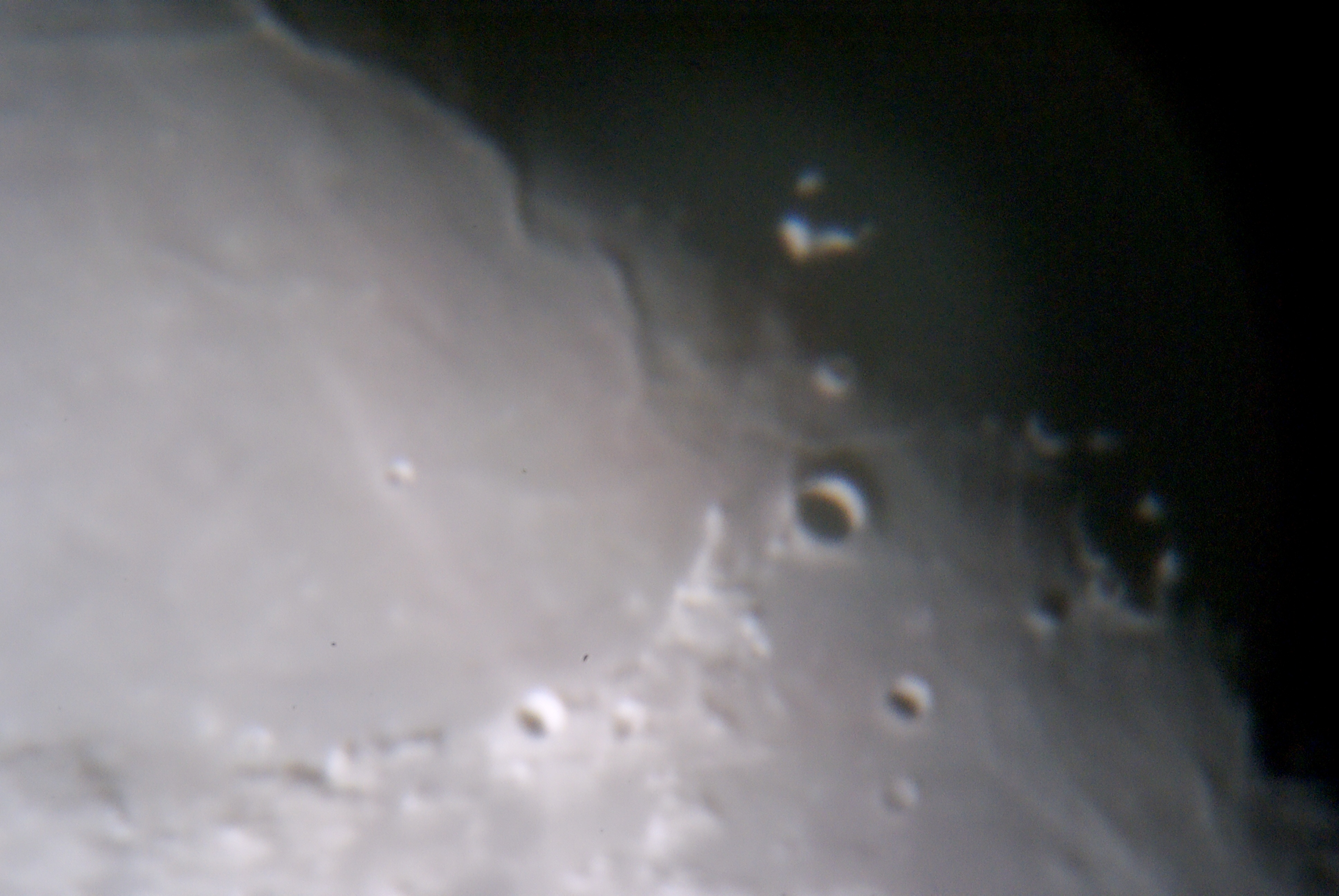 Змеиный хребет